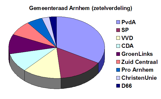 Grafiek van de Arnhemse zetelverdeling in de gemeenteraad. Deze afbeelding heb ik zelf gemaakt.